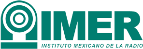 Logotipo del Instituto Mexicano de la Radio